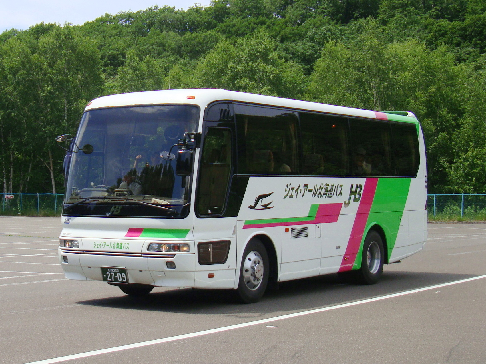 LangSwitch Error: no default